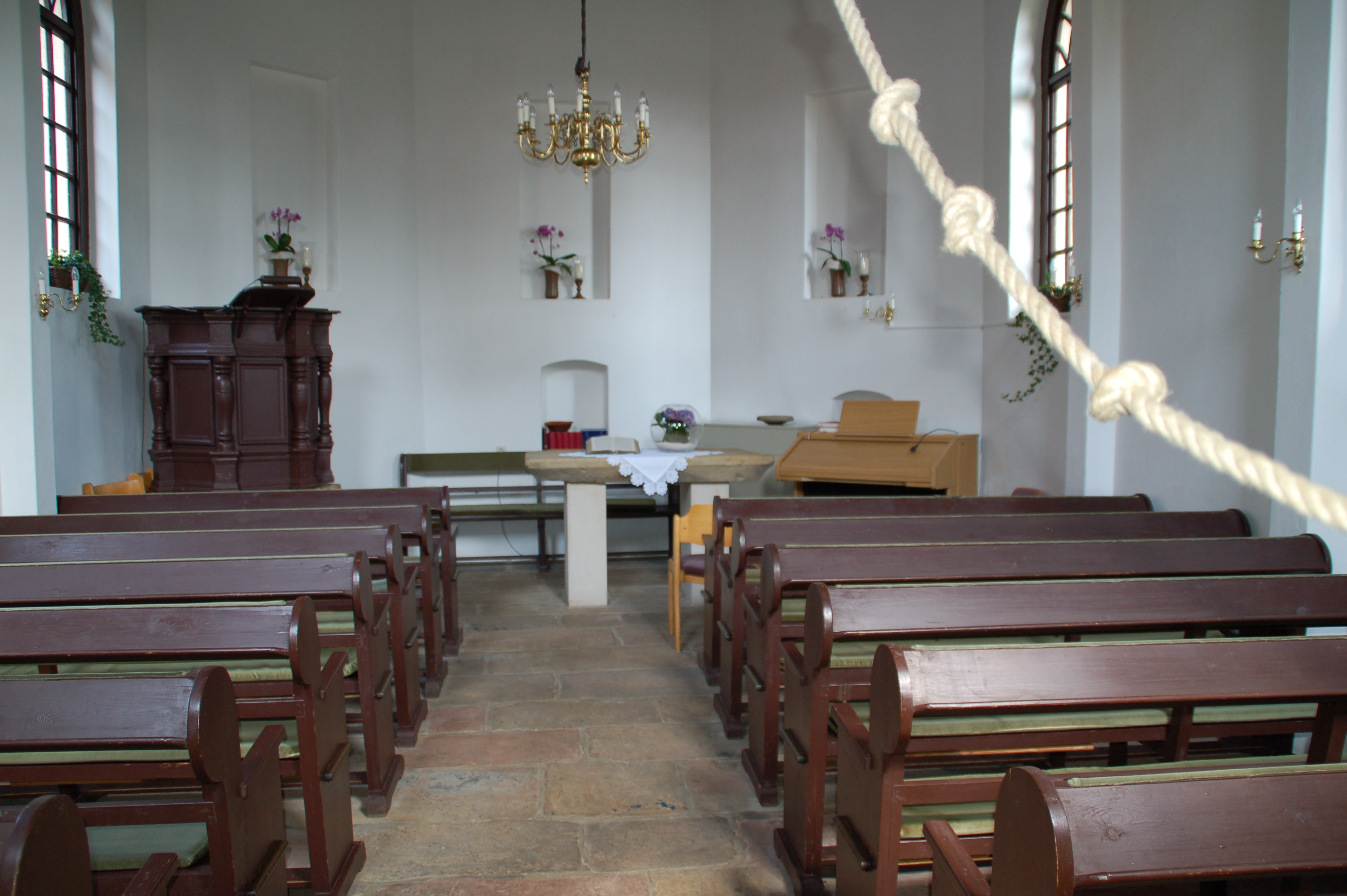 Kapelle Hesepe, Innenansicht